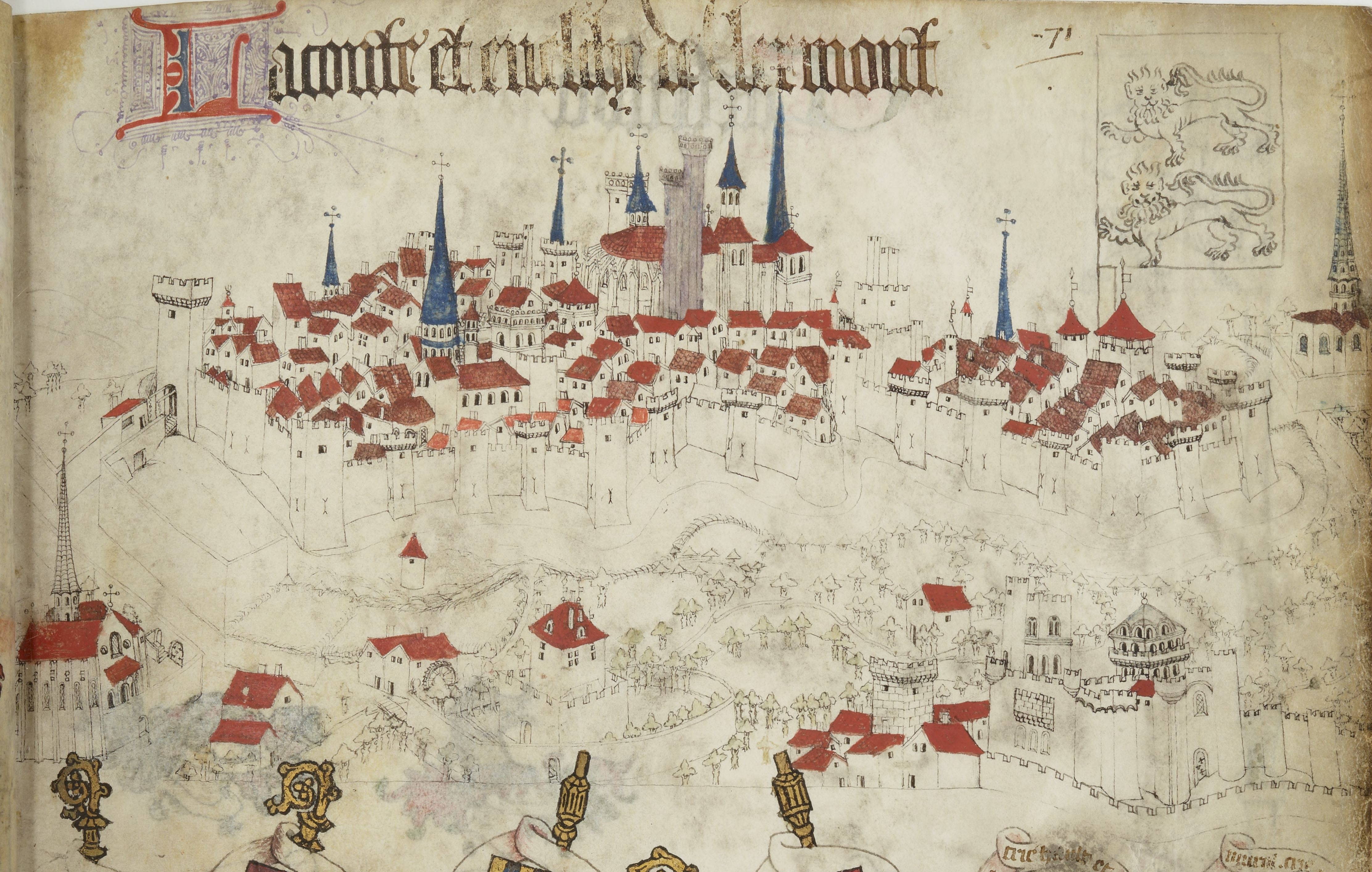 in Armorial d'Auvergne, pages présentant des chateaux, villes et blasons.